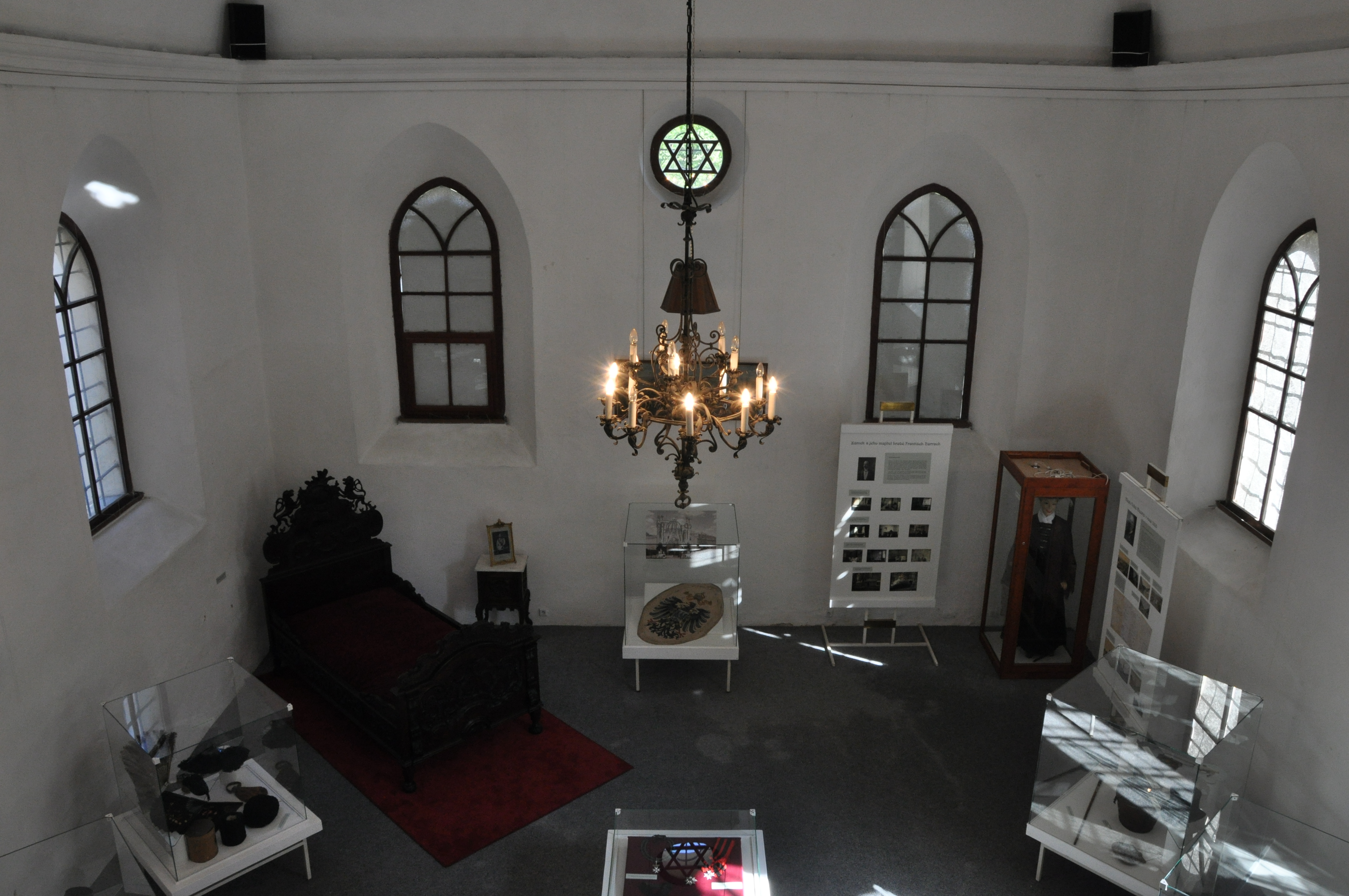 Interiér Staré synagogy ve Velkém Meziříčí